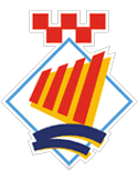 Escudo de Salou